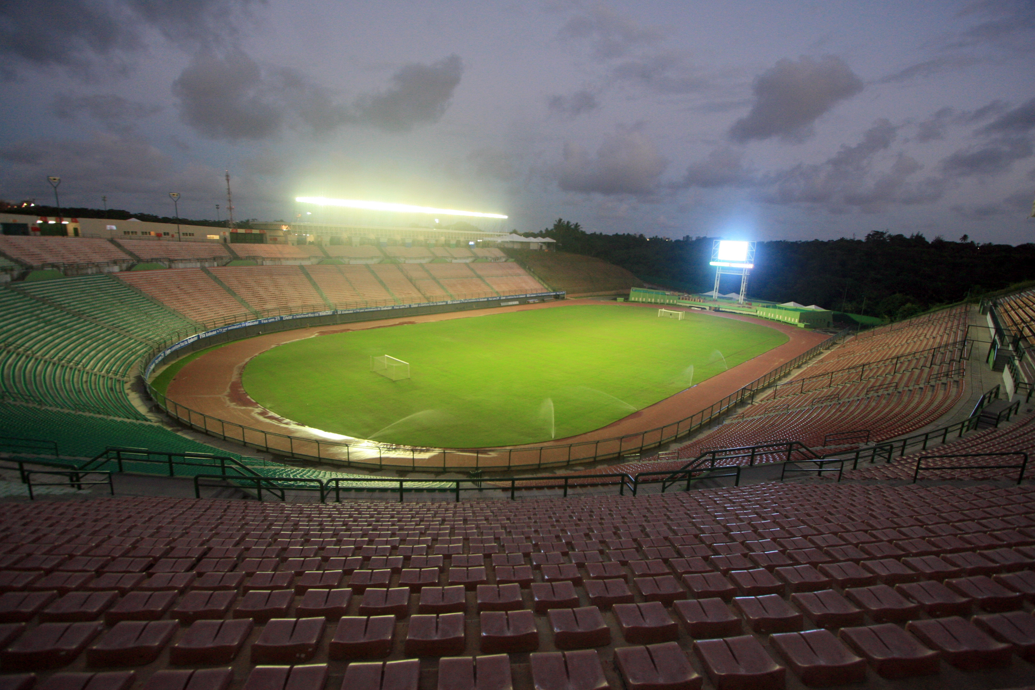 Estádio Governador Roberto Santos, Pituaçu, Salvador, Bahia.